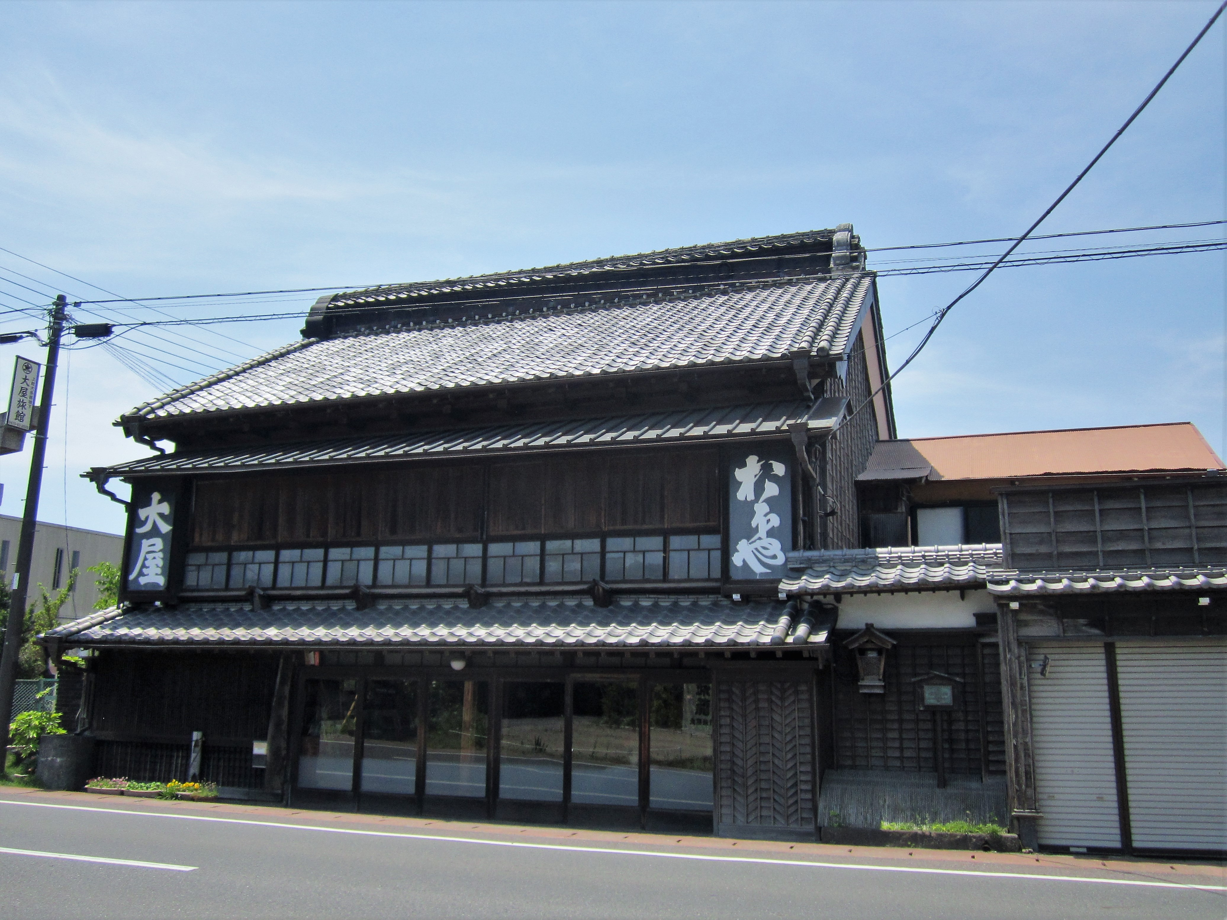 大屋旅館（大多喜町新丁） Canon PowerShot A2200